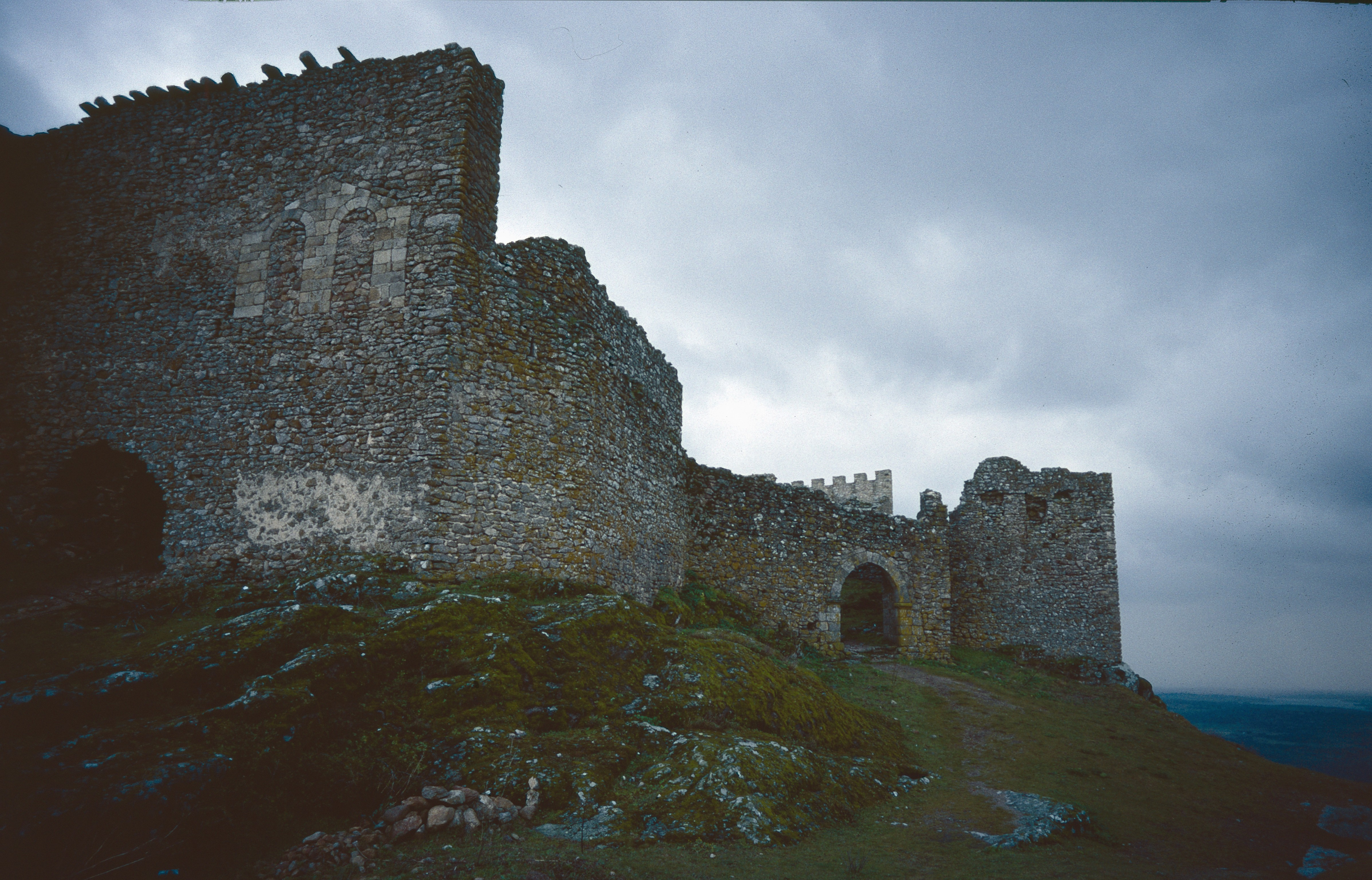 Montánchez